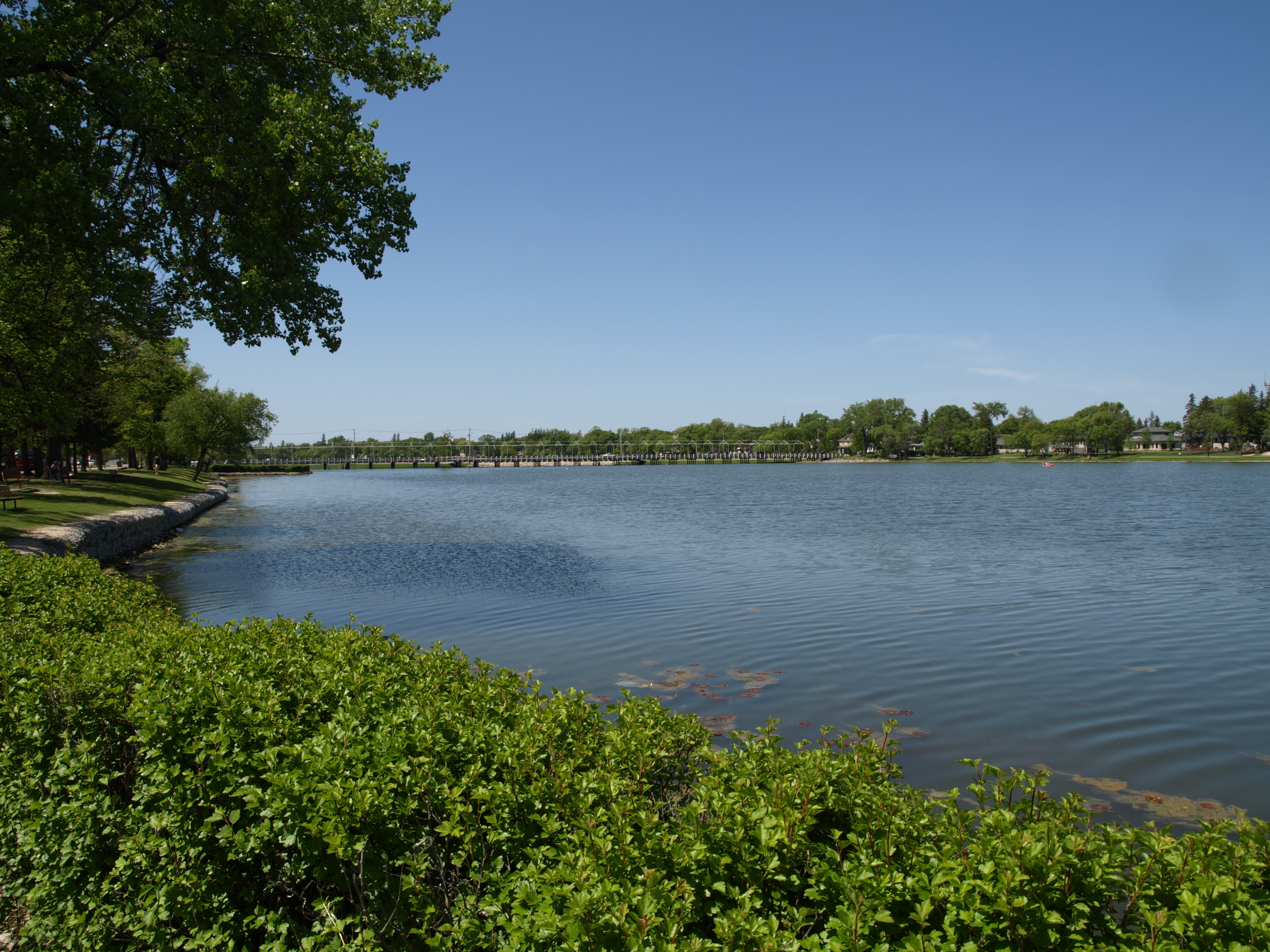 Portage La Prairie Manitoba Canada